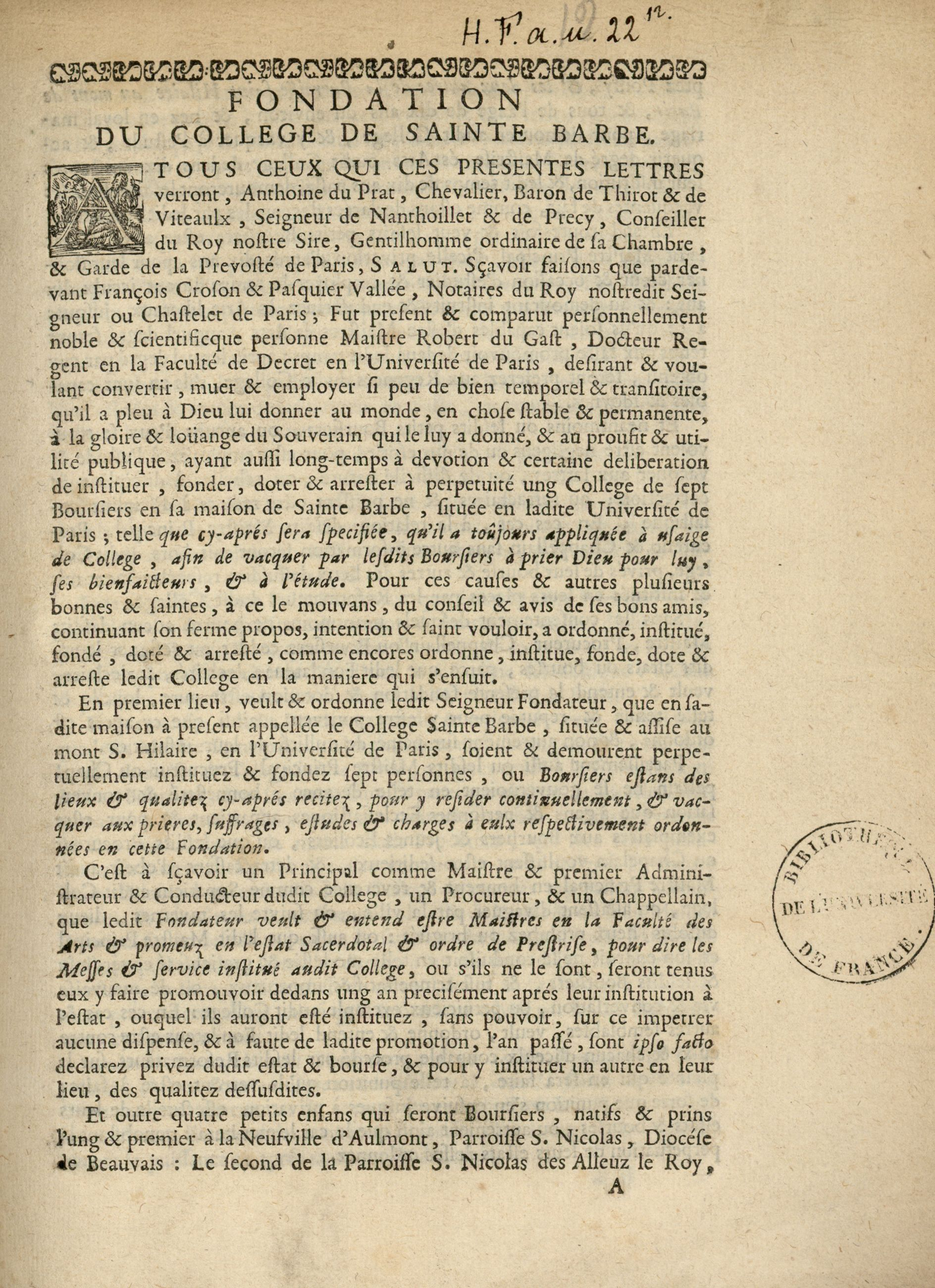 Monographie imprimée, dans un recueil de 17 pièces imprimées.